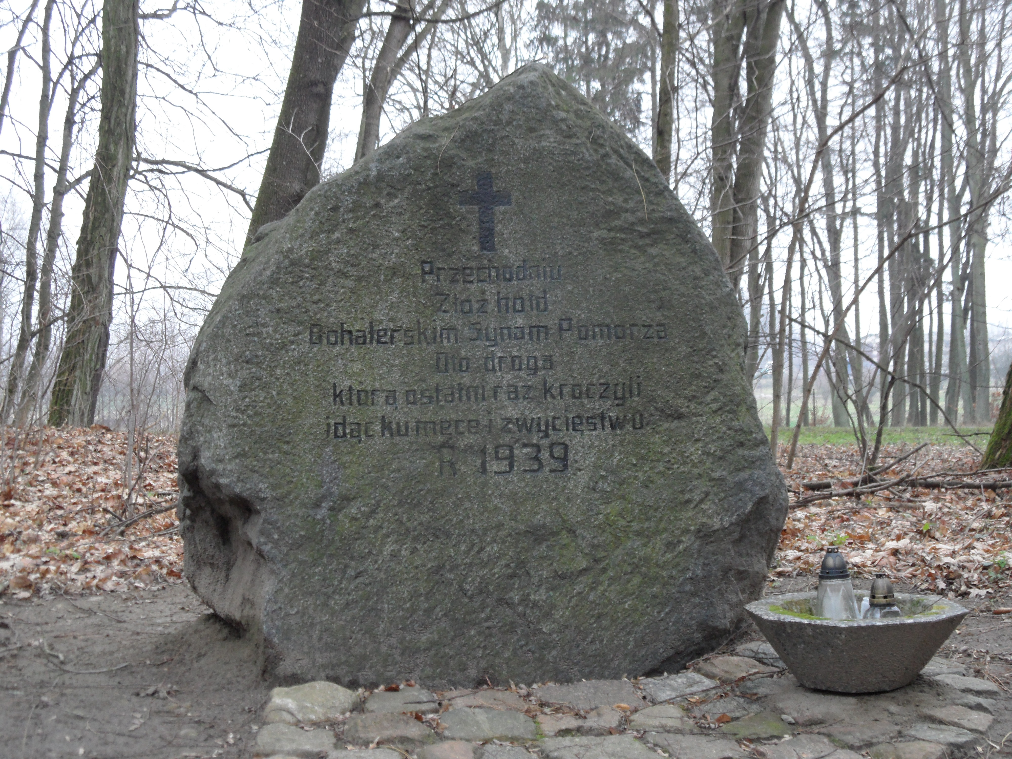 Kamień upamiętniający pomordowanych przez hitlerowców w Szpęgawskim lesie